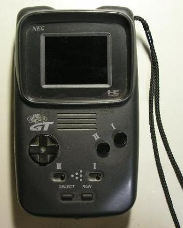 NECホームエレクトロニクス、PCエンジンGT